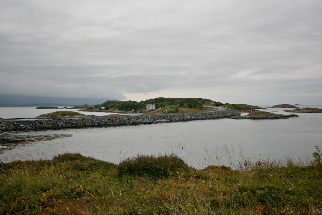 Atlanterhavsvegen